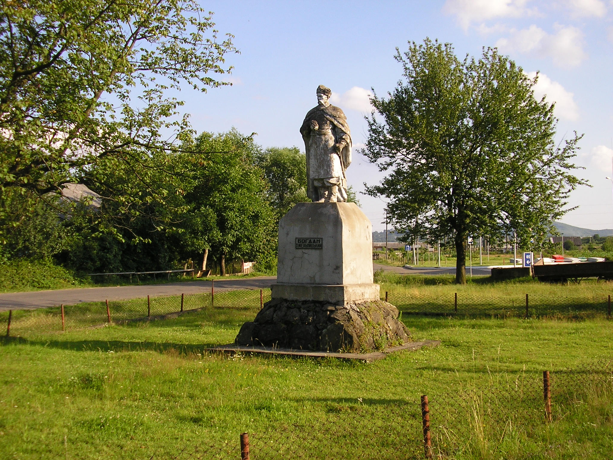 Памятник Богдану Хмельницкому в с. Драгово, Закарпатская обл.